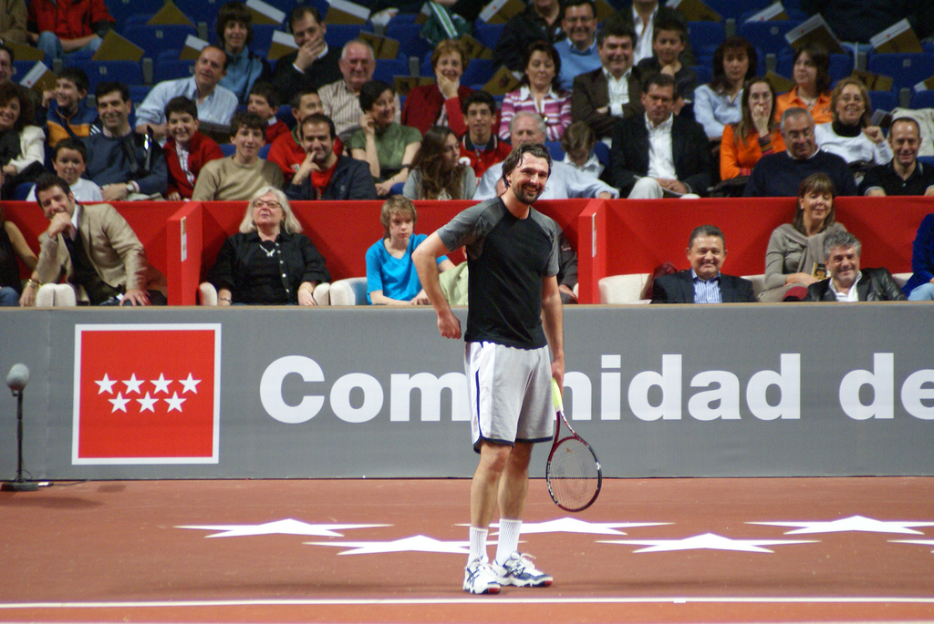 Goran Ivanišević, Madrid Masters Senior 2007